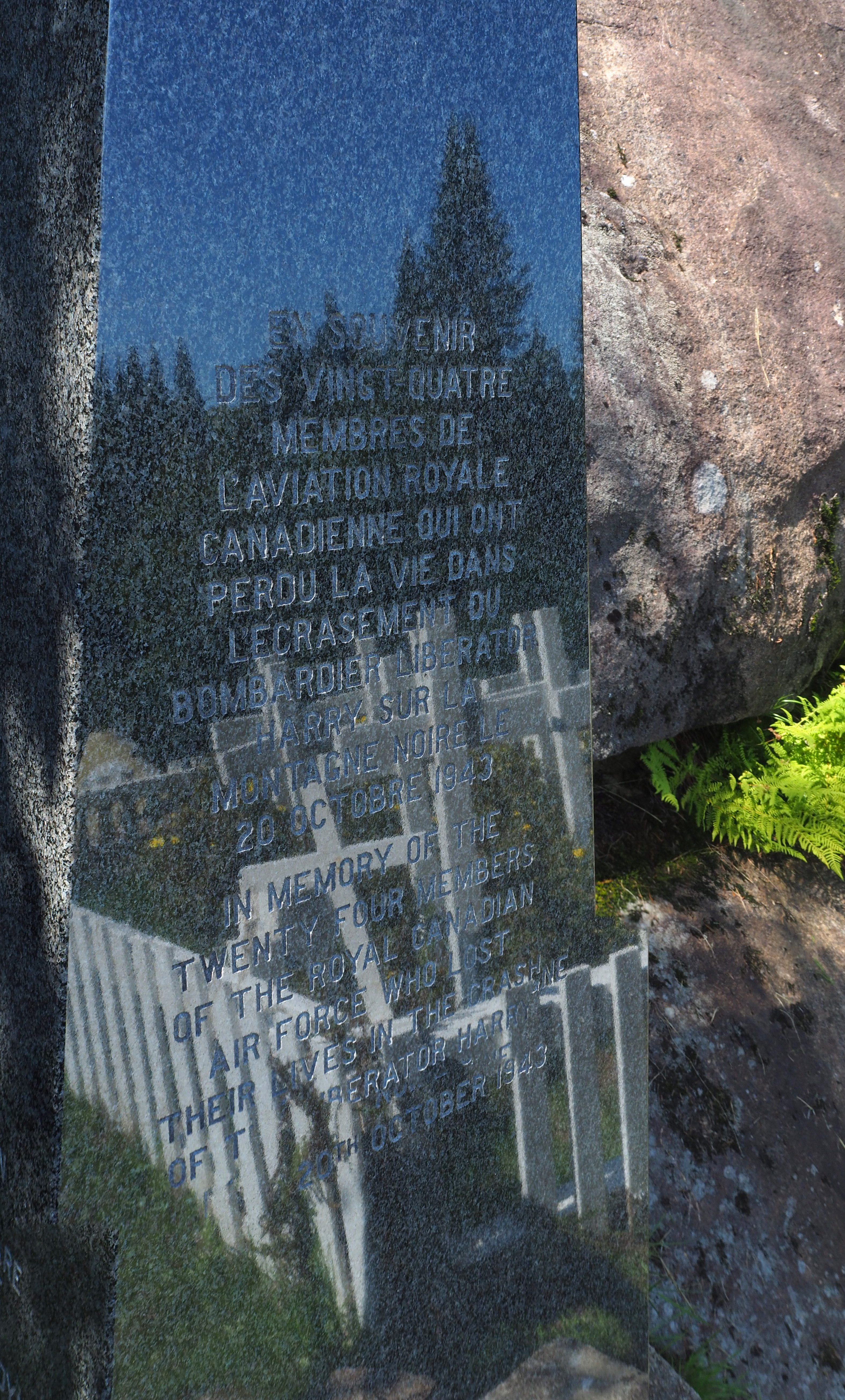 Débris d'écrasement du Liberator III, Saint-Donat